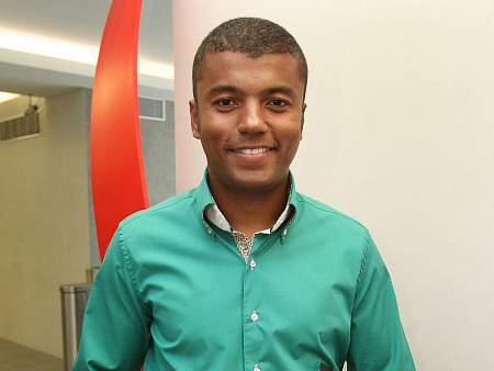 Rey Koranteng ve studio Tv NOVA.